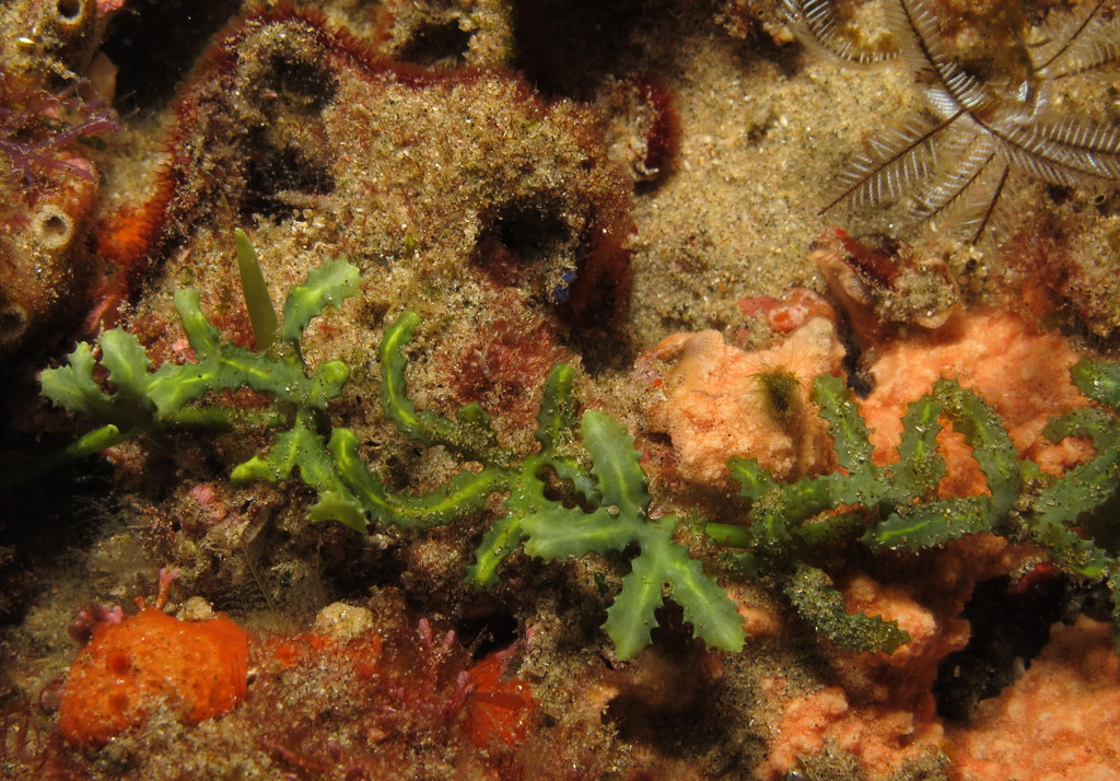 Caulerpa serrulata, Ponta do Ouro, Mozambique